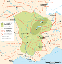 Kiswahili: Hii ni ramani inayoonesha Ufalme wa Burgundy